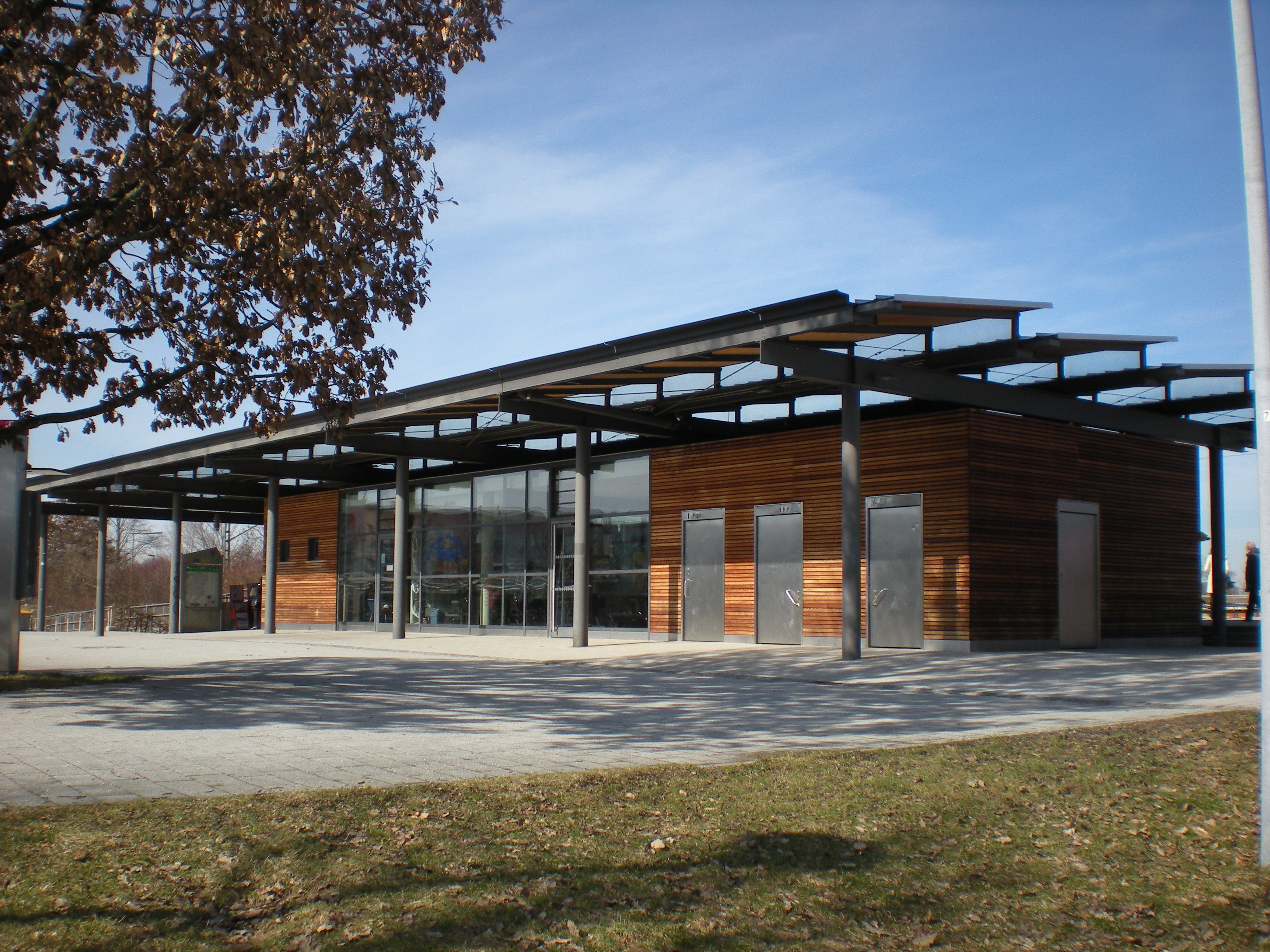 Empfangsgebäude des Münchner S-Bahnhofs Eichenau von der Straßenseite